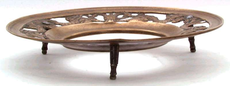 Bordskåner støpt i bronse og datert 1642. Innkommet fra Fradrikstad. Foto Norsk Folkemuseum, NF.1906-2055.